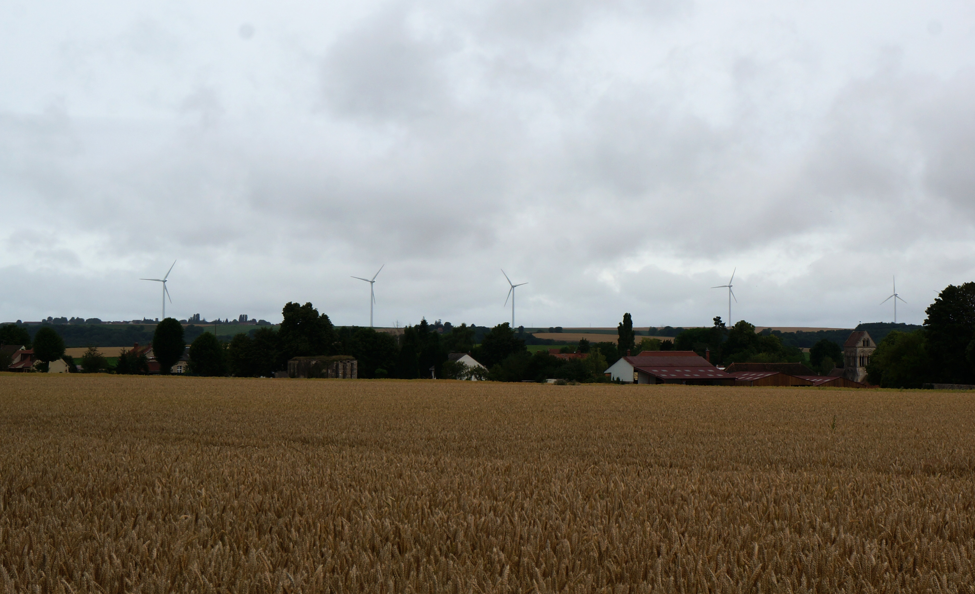 parc éolien de l'Ourcq et du Clignon.